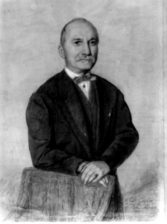 Epoca: 1868 Autore: Luigi Calamatta Tecnica: disegno a matita nera e biacca su carta bruno chiara Descrizione: Ritratto frontale a due terzi di figura; il colonnello Alessandro Cialdi è in piedi, appoggiato ad una sedia. Non fu portato a termine per la morte dell'artista 1869. Iscrizioni a matita: al Comm. Cialdi, il suo amico L.C. 1868 Roma. Misura: cm 47,5 x 30,5